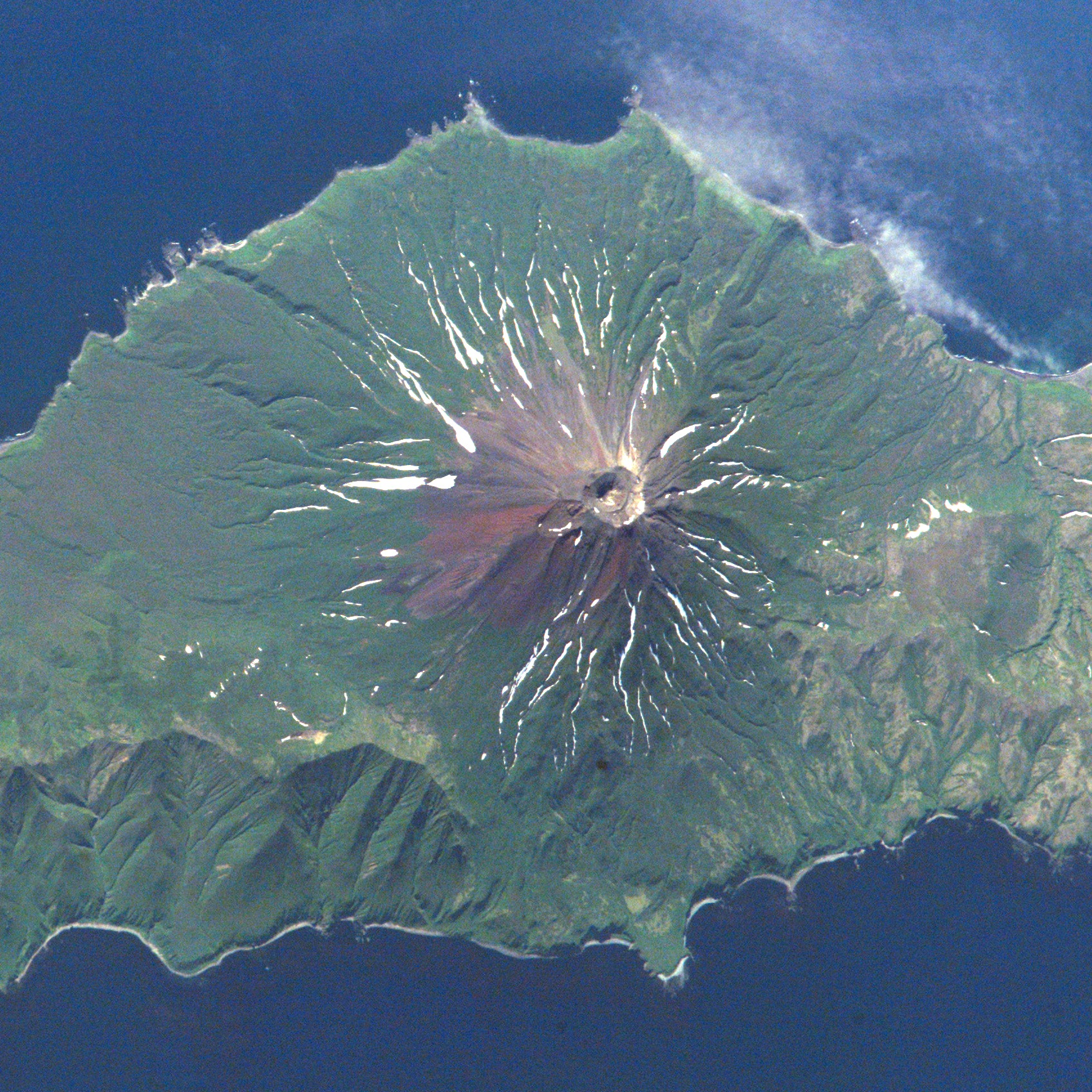 Вулкан Прево. Снимок с МКС. Фрагмент